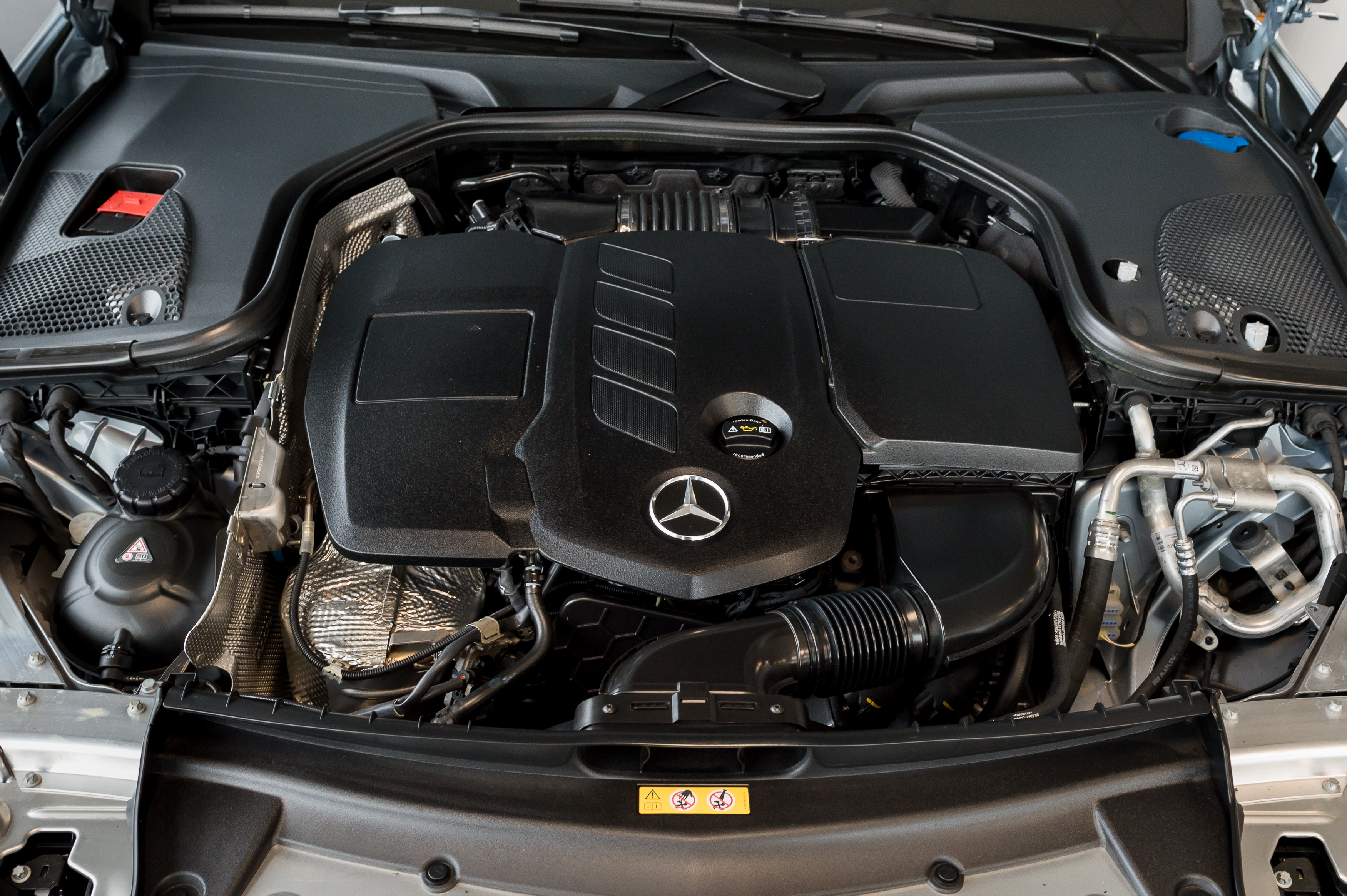 Mercedes-Benz Motor 654 im Typ 213, aufgenommen im Autohaus Eugen Sing in Heidenheim.